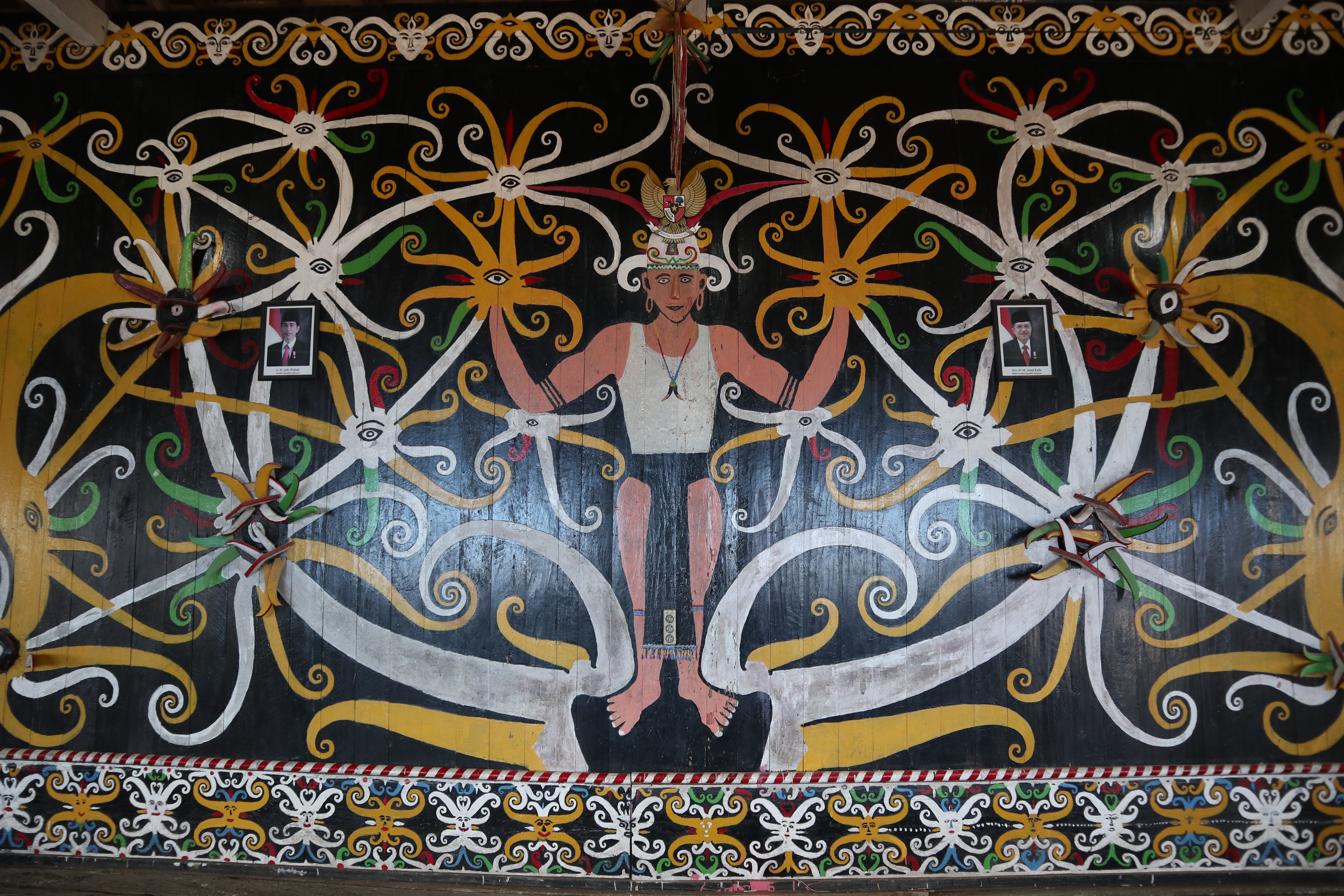 Gambar motif khas Dayak Kenyah di dinding Lamin Adat Dayak Kenyah Lung Anai, kecamatan Loa Kulu, Kabupaten Kutai Kartanegara, Kalimantan Timur.